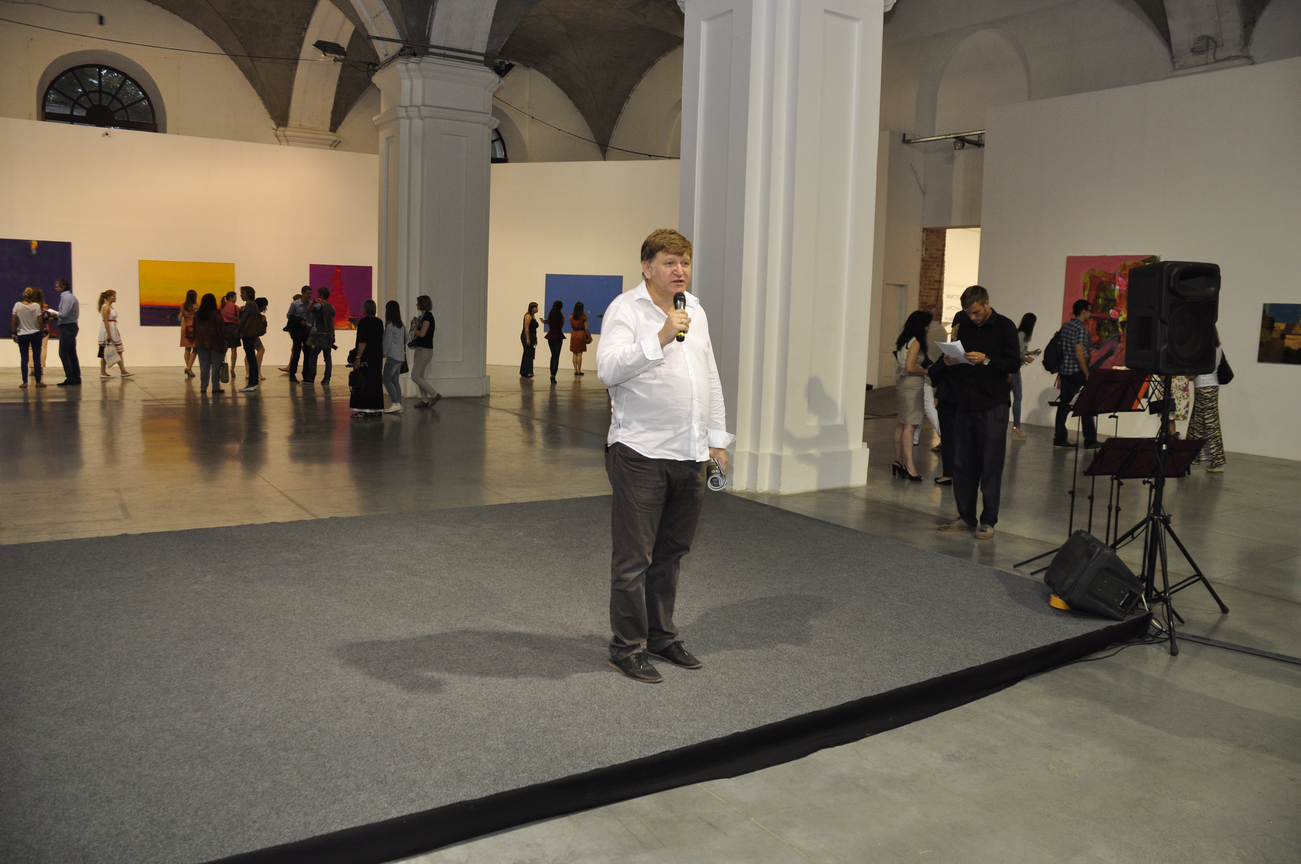 Евгений Карась на открытии проэкта "Украинский Пейзаж", Мыстецкий Арсенал, Киев, 2014